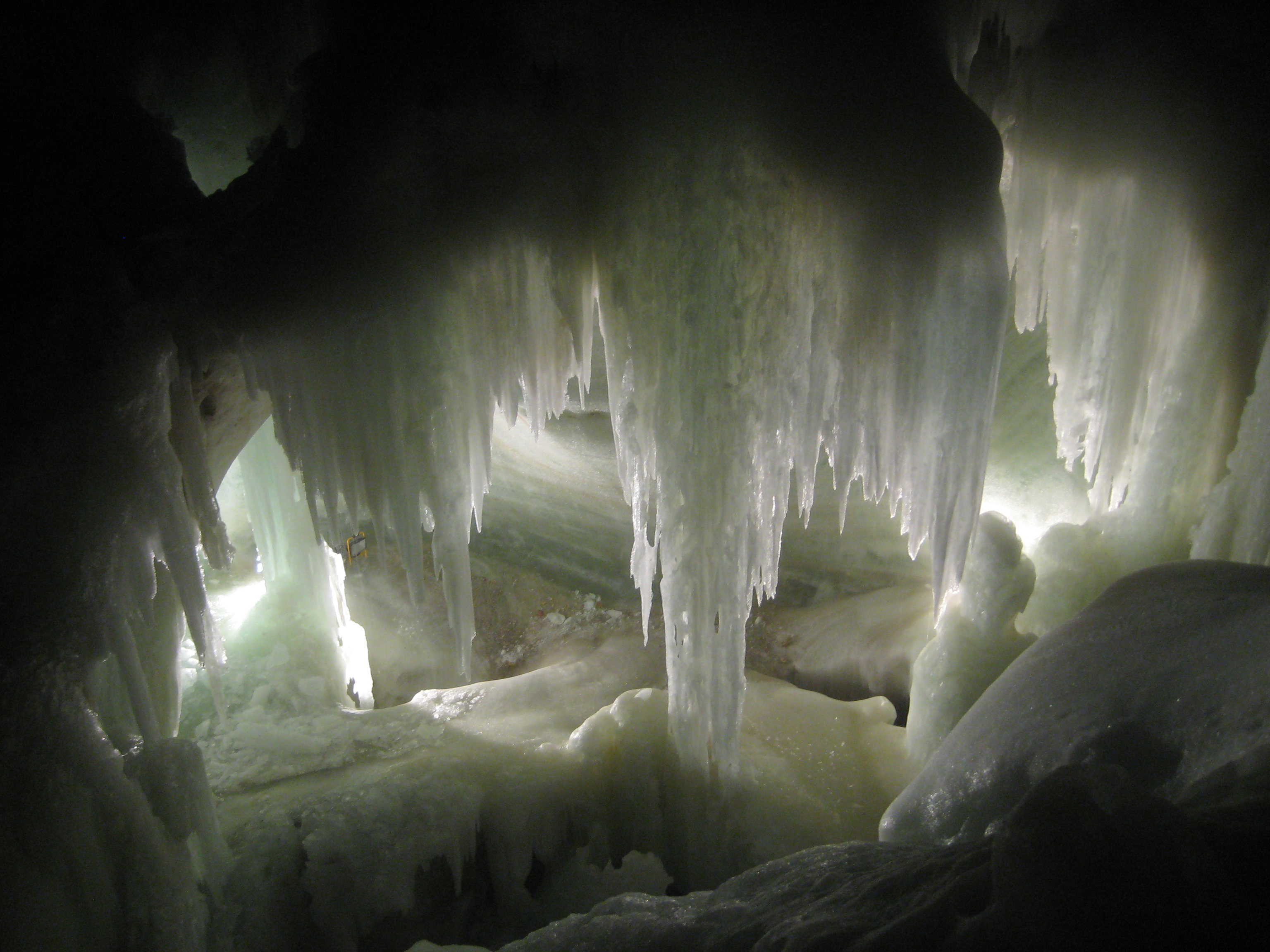 Dachstein-Rieseneishöhle This media shows the natural monument in Upper Austria with the ID nd597.